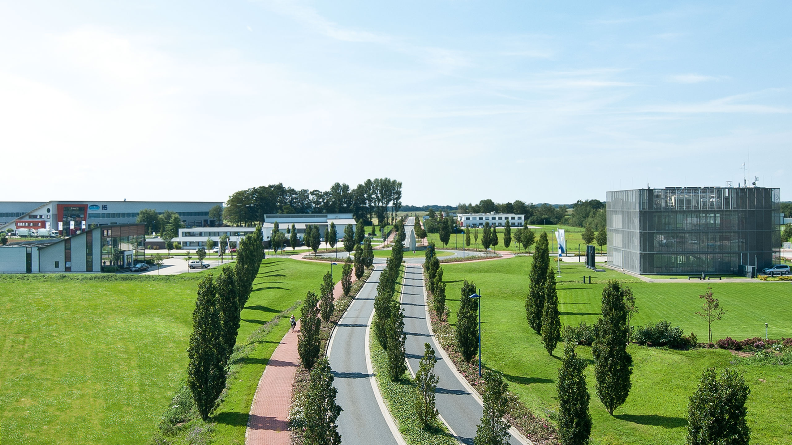 Bild vom ecopark in Emstek